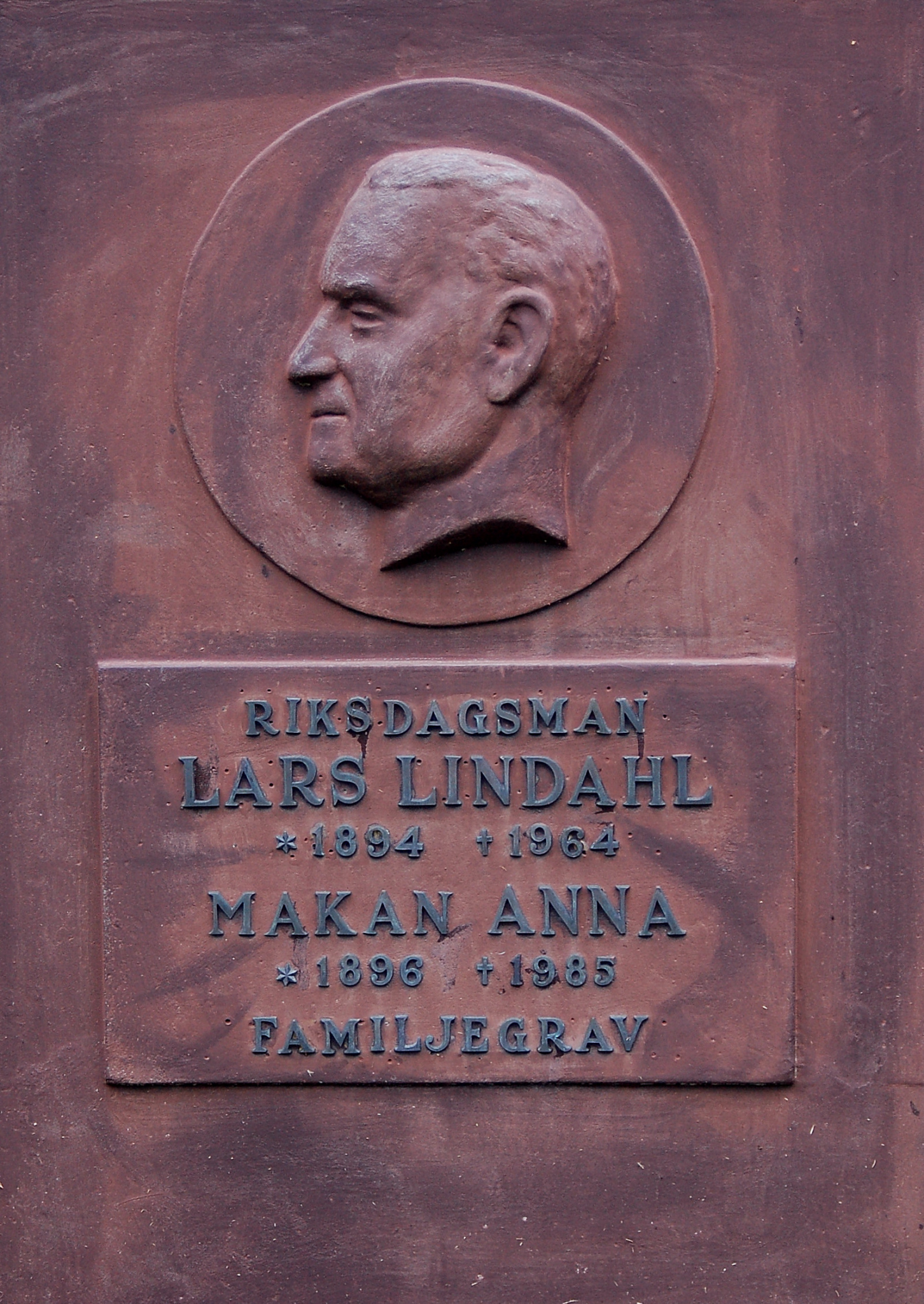 Riksdagsman Lars Lindahls gravvård vid Ramuneboda kloster.